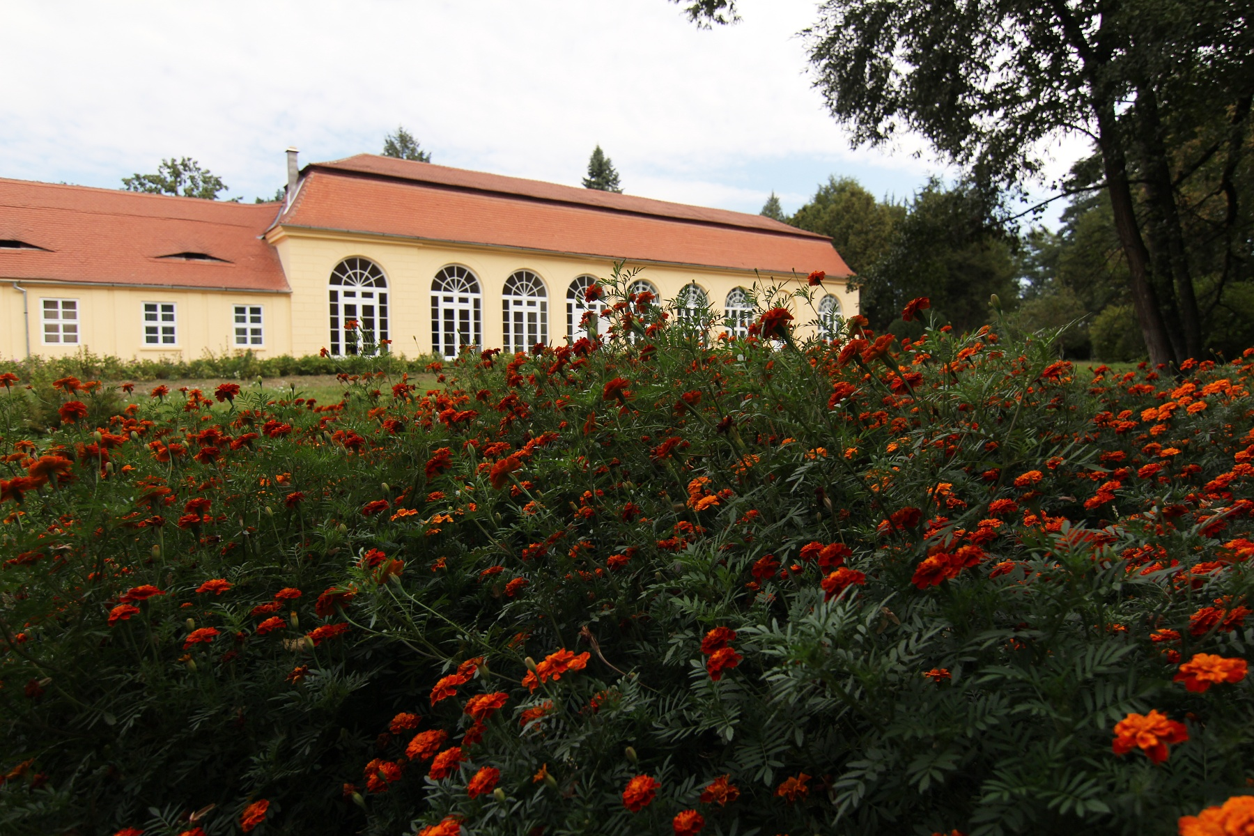 Oranjeria castelului Bruckental din Avrig 02